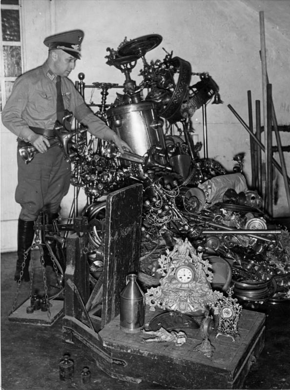 Berlin, Metallspende Scherl Bilderdienst: Noch nicht 48 Stunden nach Beginn der Metallspende türmen sich in den Sammelstellen [in Berlin] die von der Bevölkerung gespendeten Metallgegenstände zu Bergen. Fot.: Wag.; 28.3.40 2594-40